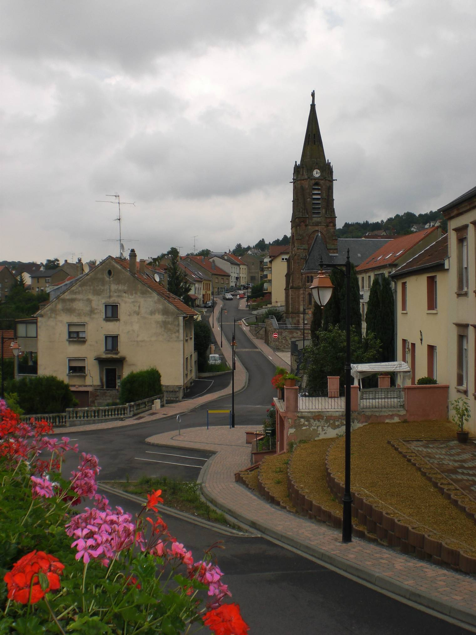 Ortsmitte von Oeting, Frankreich